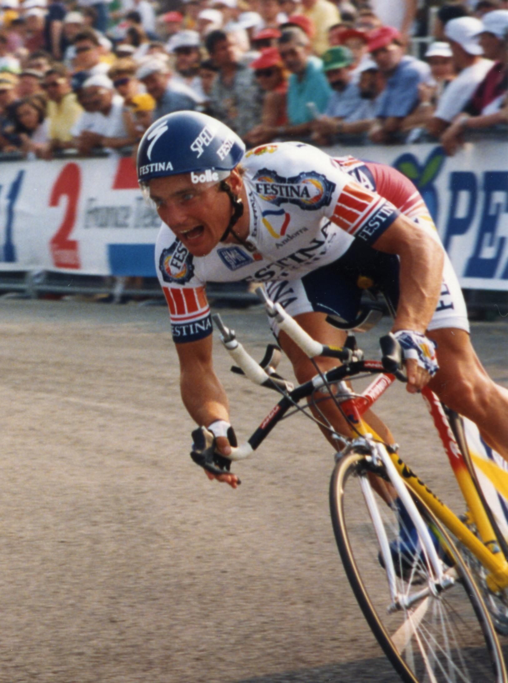 TOUR DE FRANCE1993